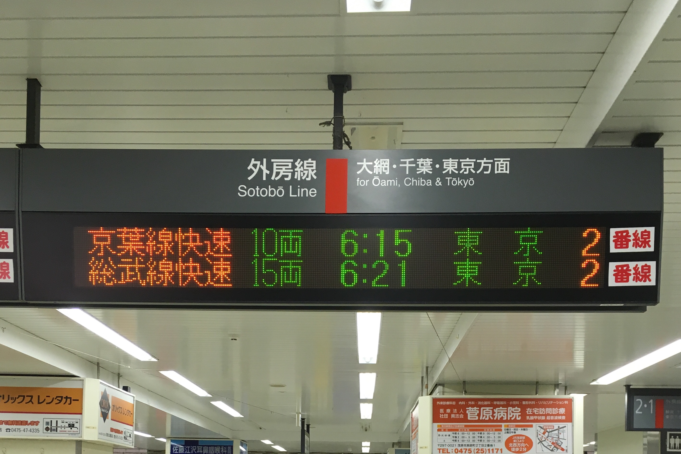 外房線から経由地が異なる東京行き（茂原駅）